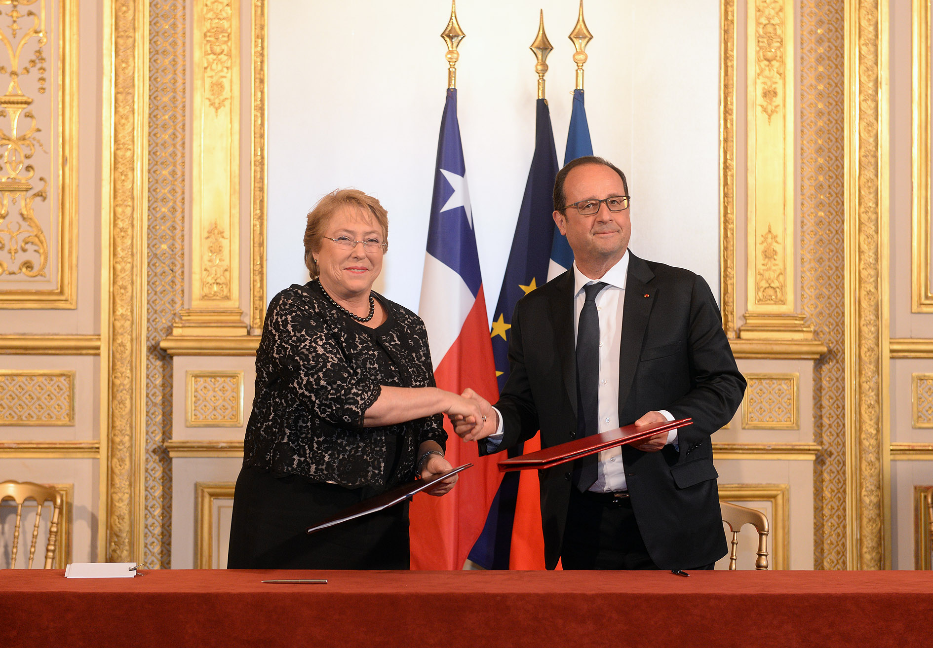 Gobierno de Chile